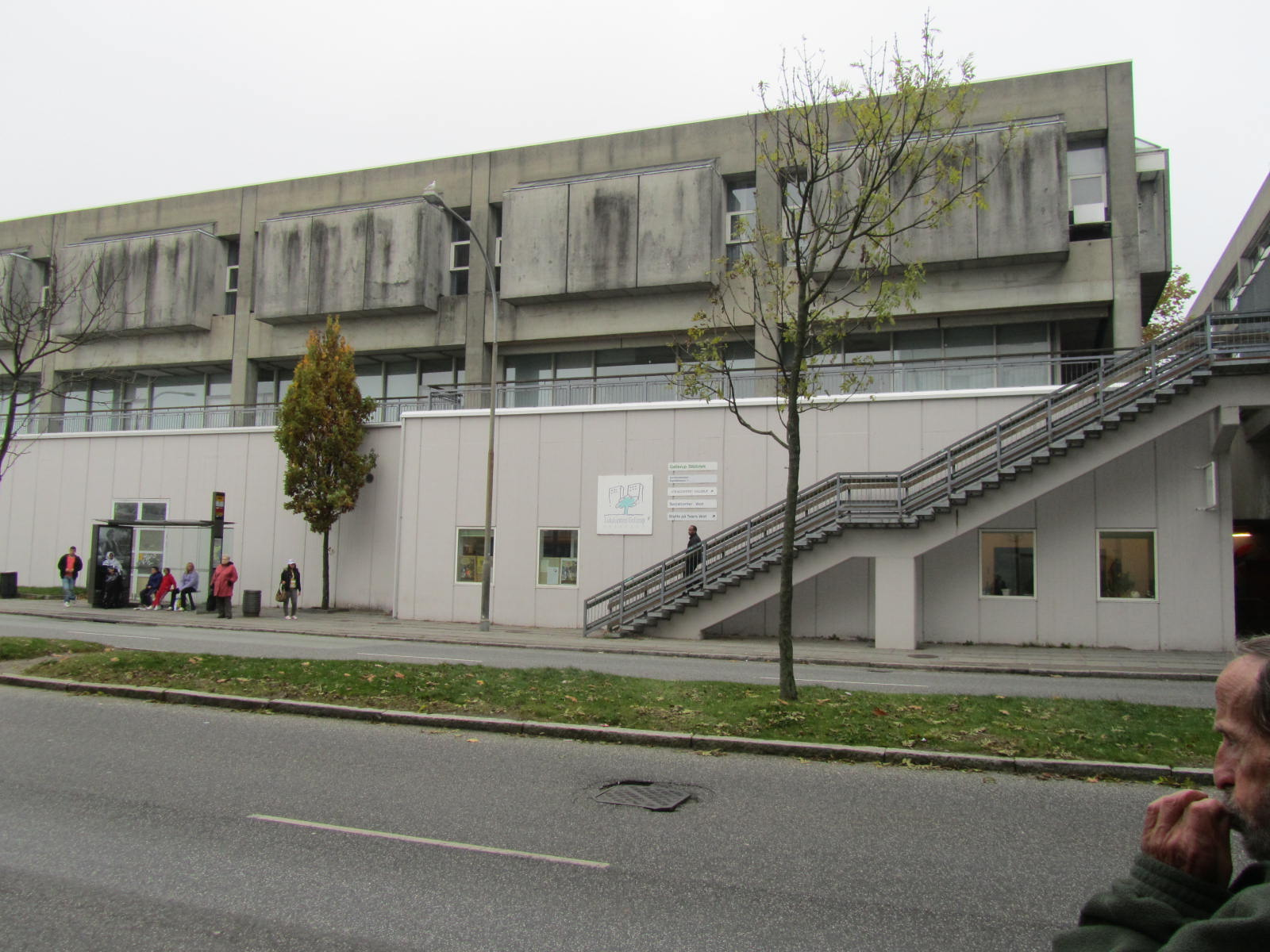 Gellerup (Taani), a. 2011